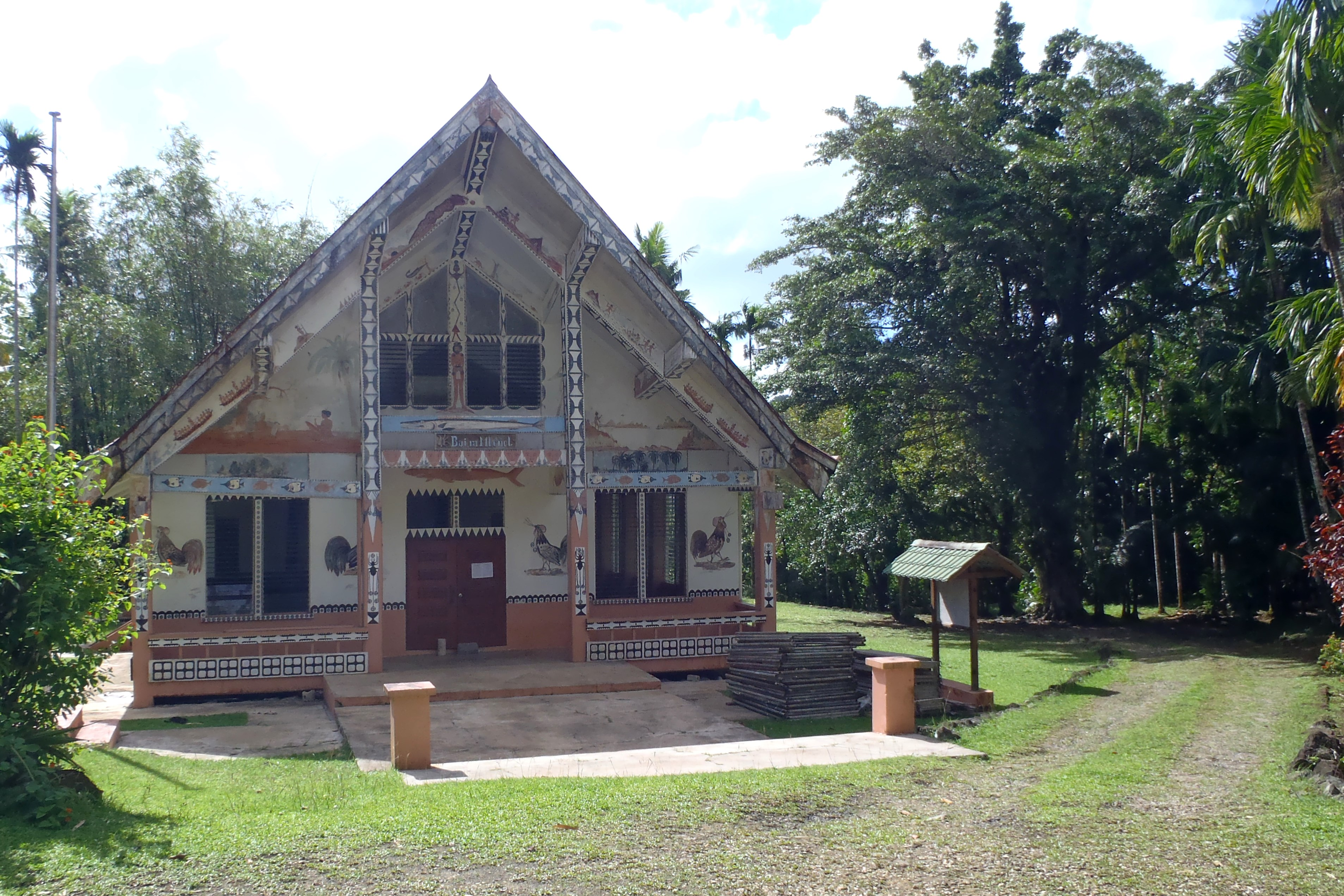 A traditional Palauan hut, 2012.